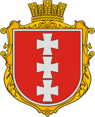 Герб с. Крупське (Кіровоградський район)